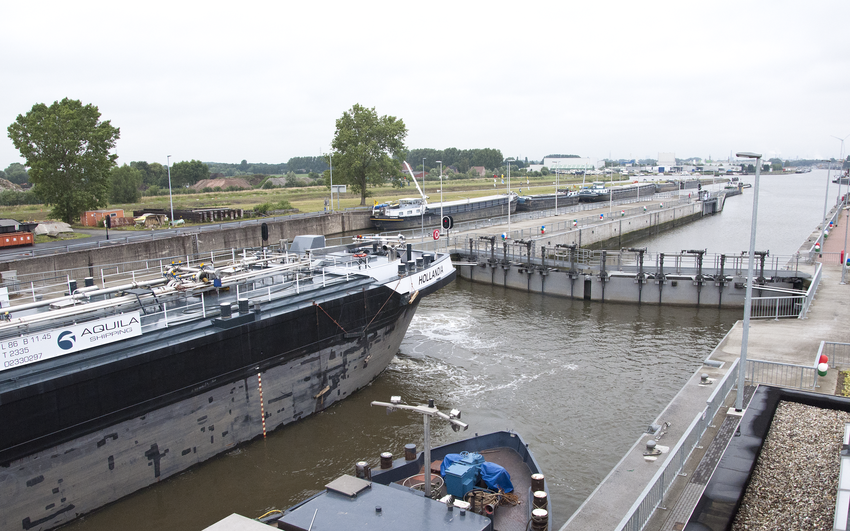 De nieuwe sluis van het sluizencomplex van Evergem, België vanaf het zuiden, met links kleinere schepen die aangemeerd liggen aan de kademuur van de oude sluis